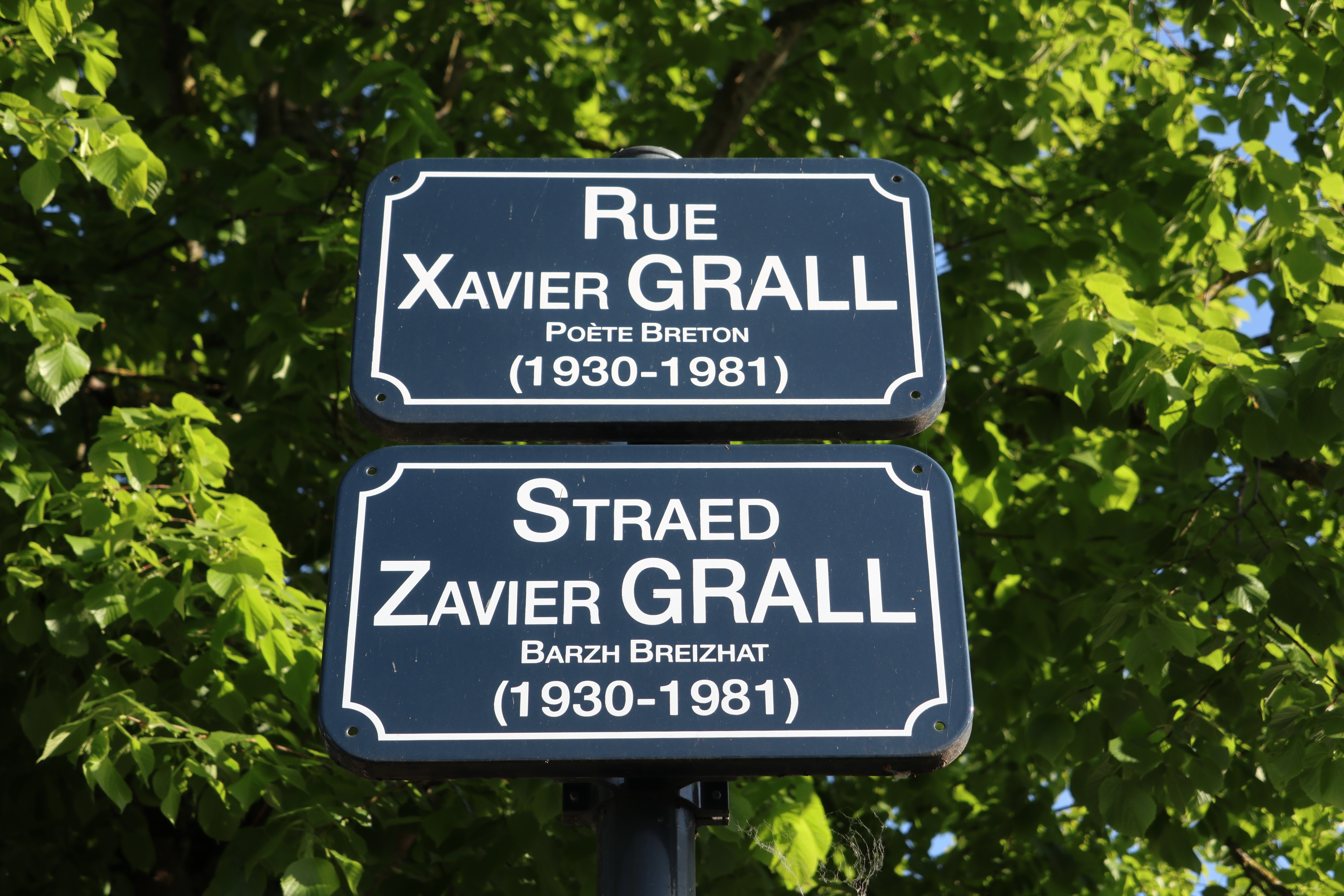 Plaques de rue à Rennes.